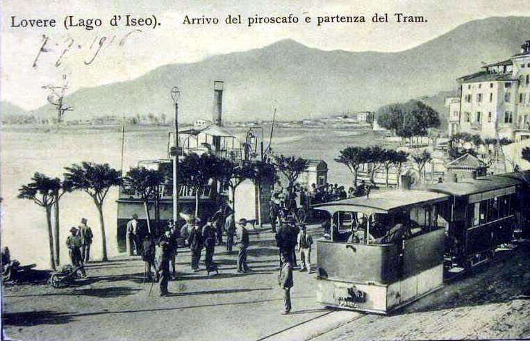 Lovere. Arrivo del Battello e partenza del tram.